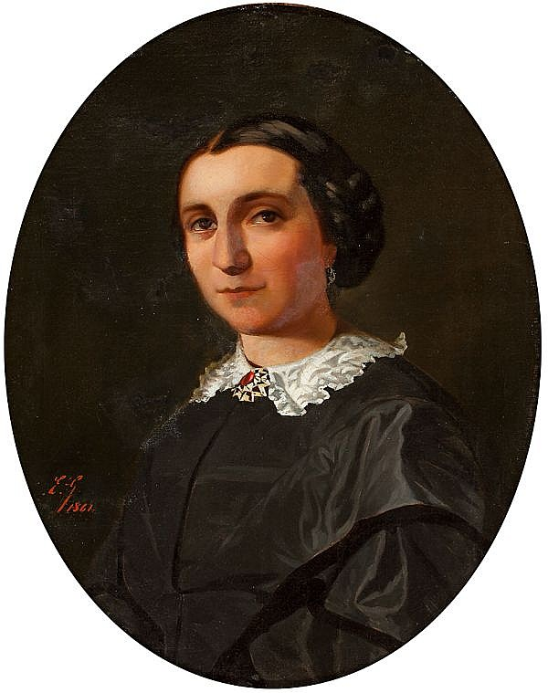 oil paintings on canvas Signed and dated in 1861